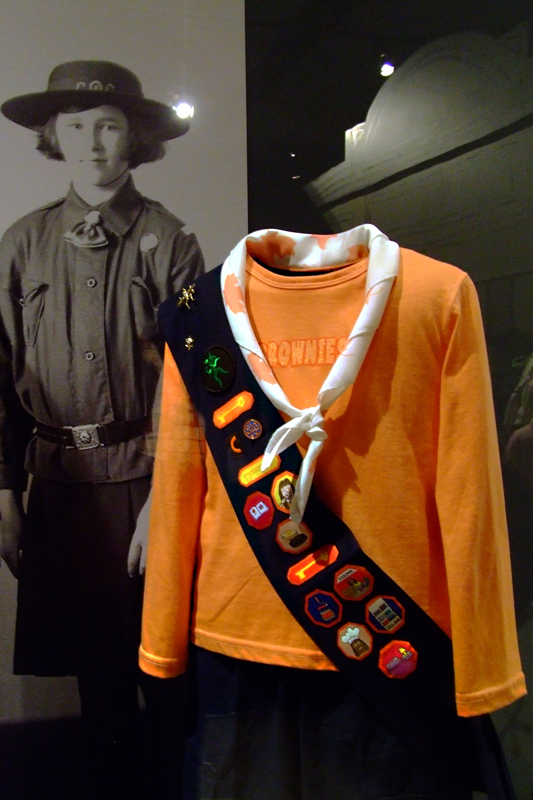 Montreal, Canada